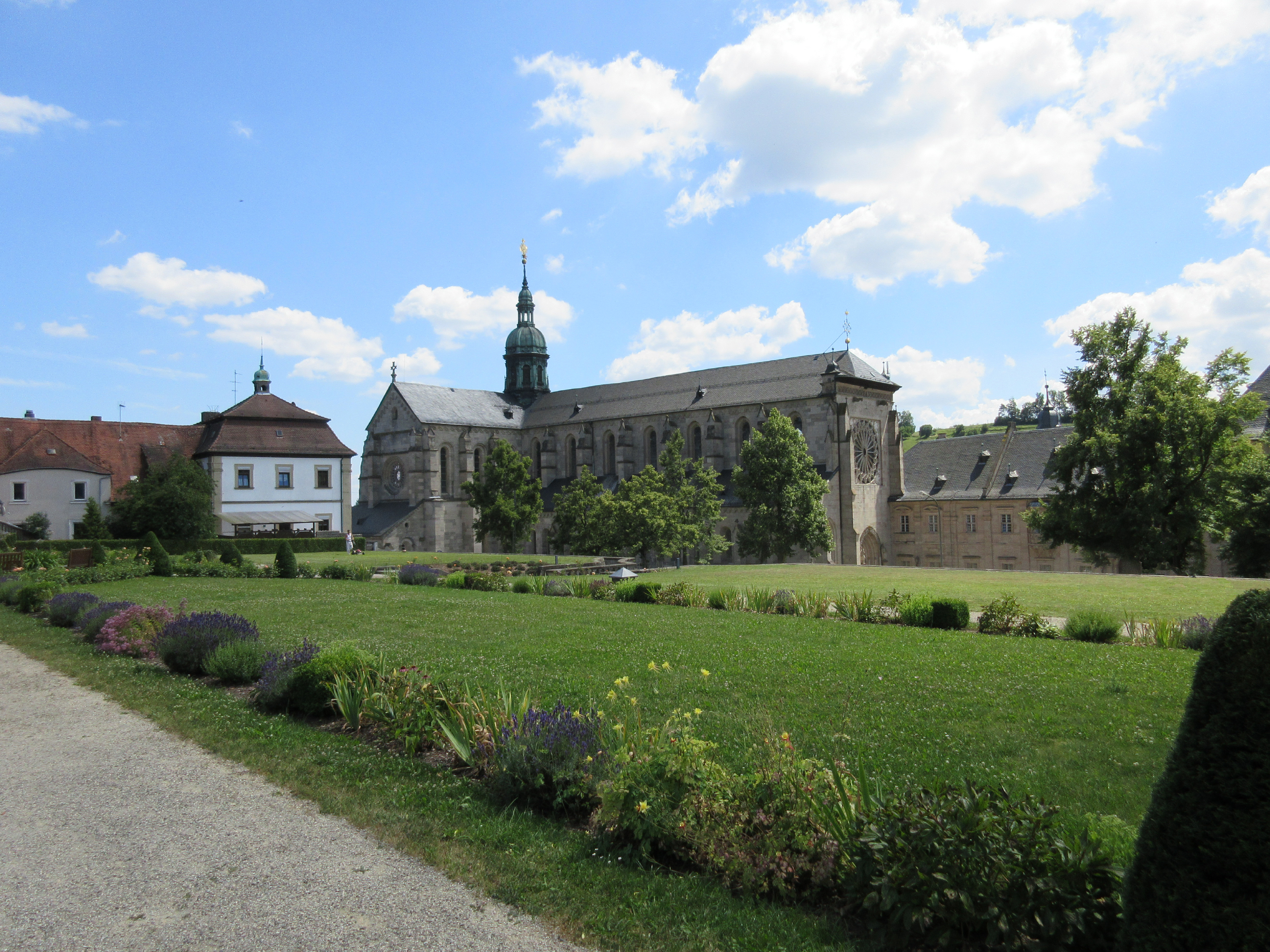 Ebrach-Oberer-Abteigarten-Basilika